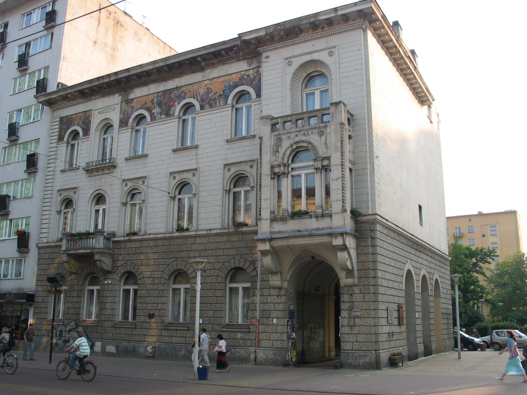 Pałac Juliusza Kindermanna – ul. Piotrkowska 137/139 w Łodzi